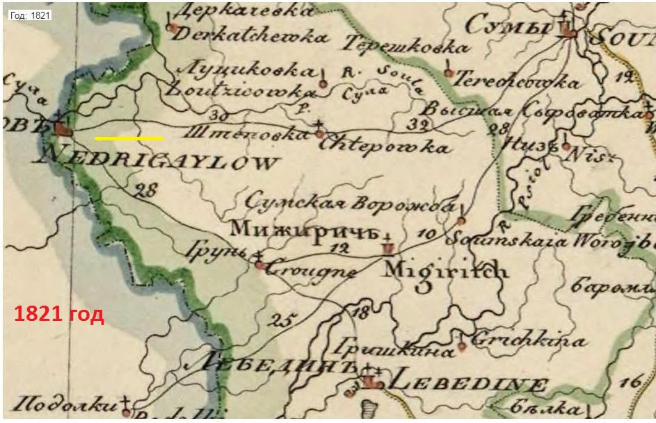 Карта _1821 год